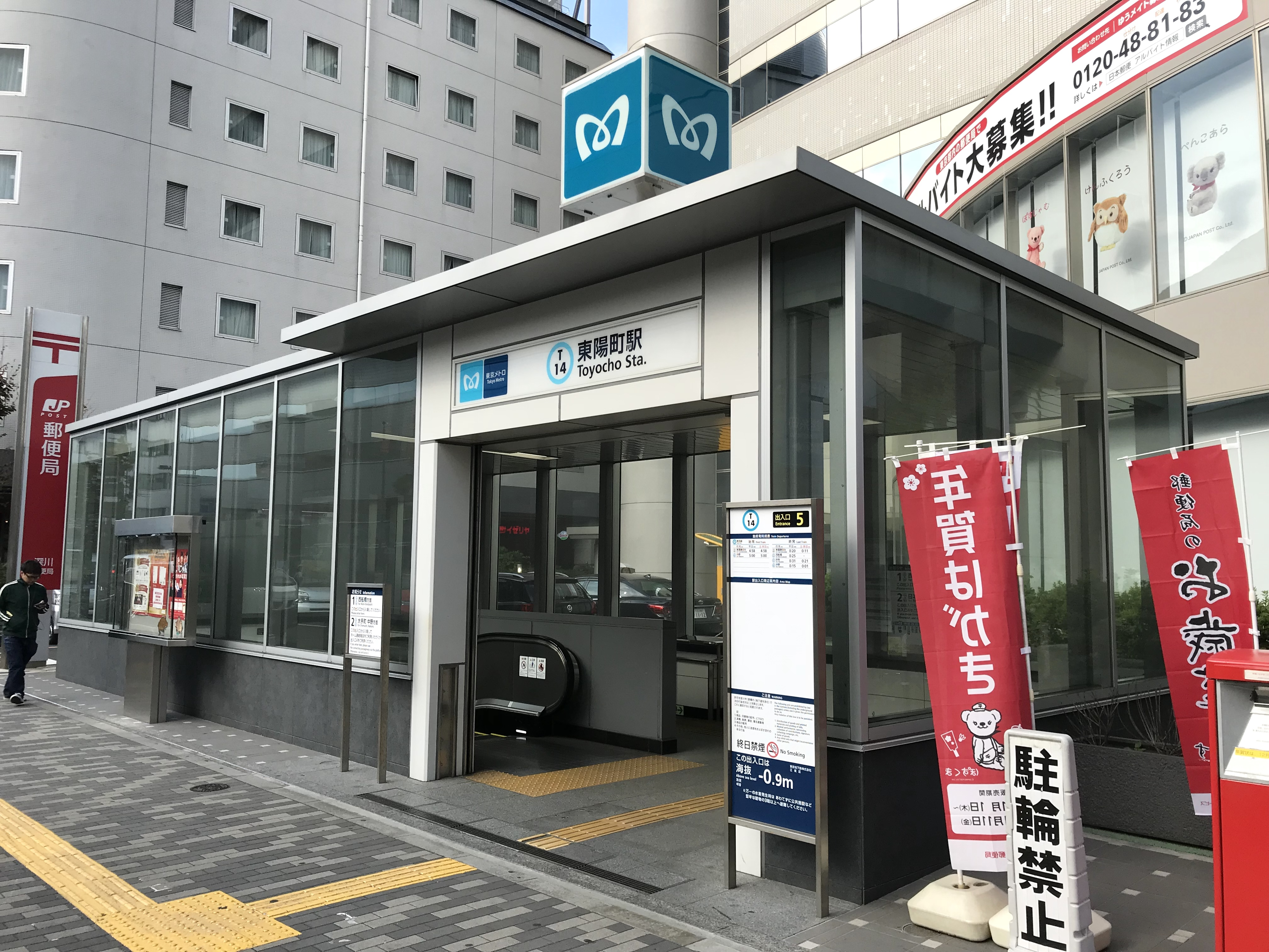 東京メトロ東西線東陽町駅5番出入口